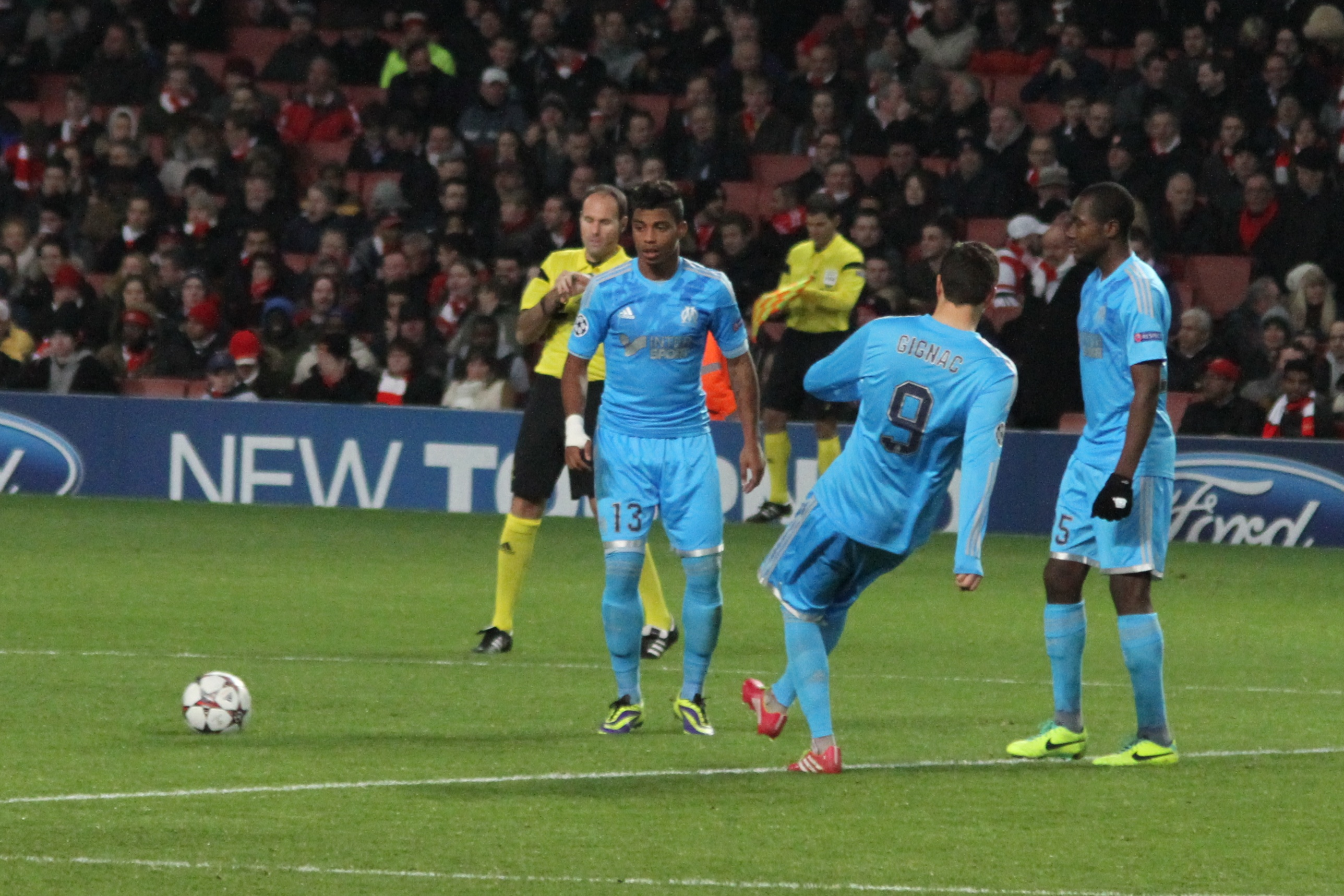 Mario Lemina, André-Pierre Gignac and Gilbert Imbula